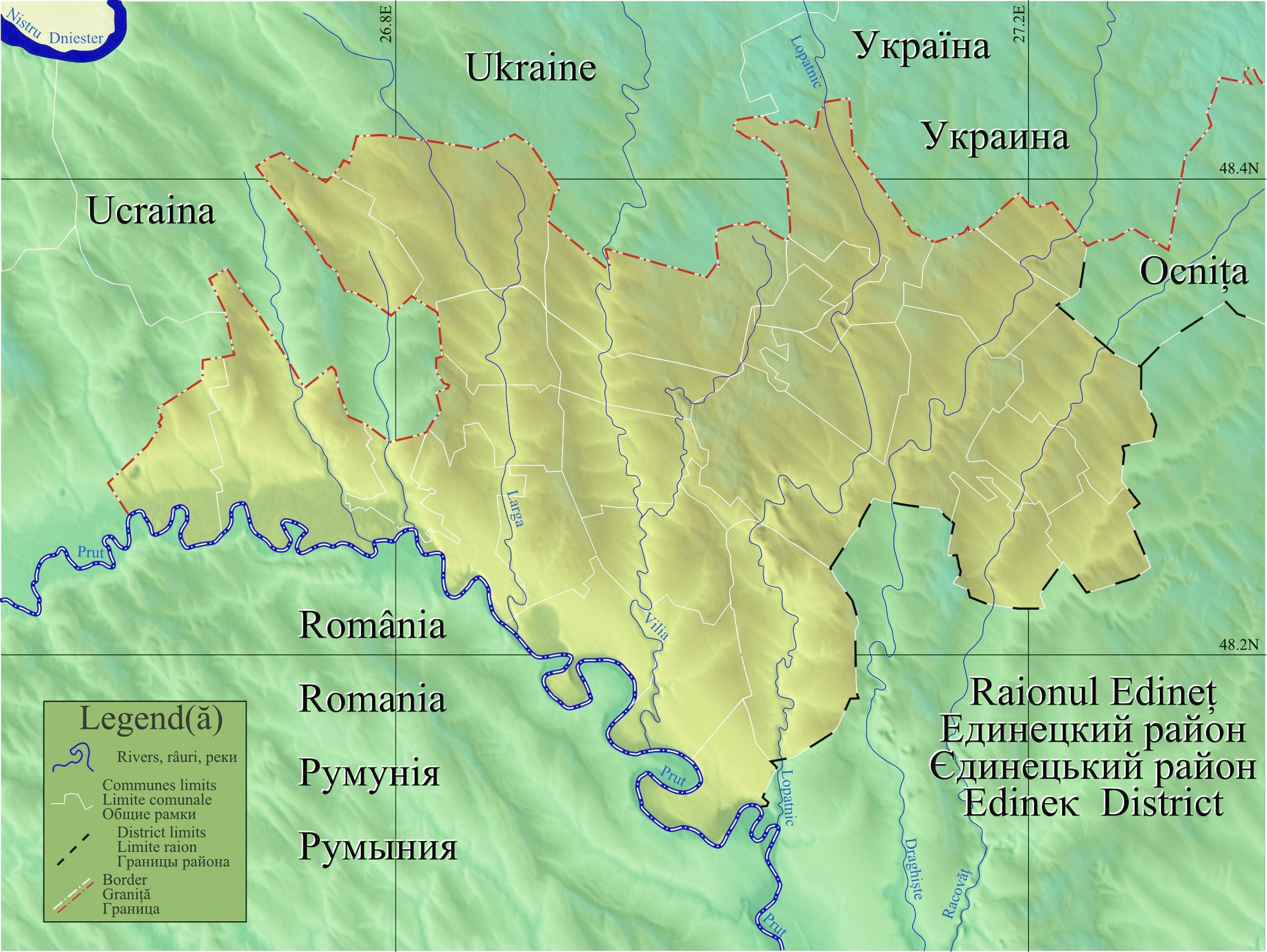 Harta de localizare Moldova Briceni local.